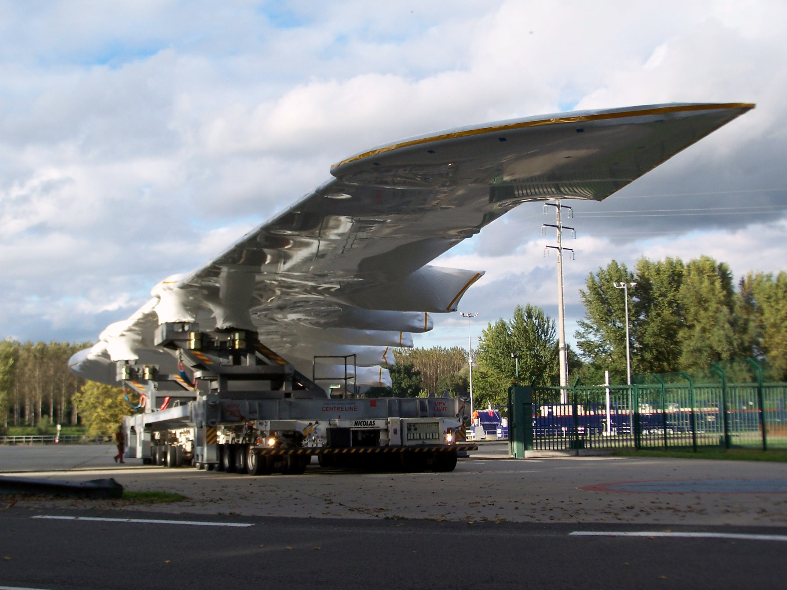 Transport d'une aile d'Airbus à Langon (Gironde, France)